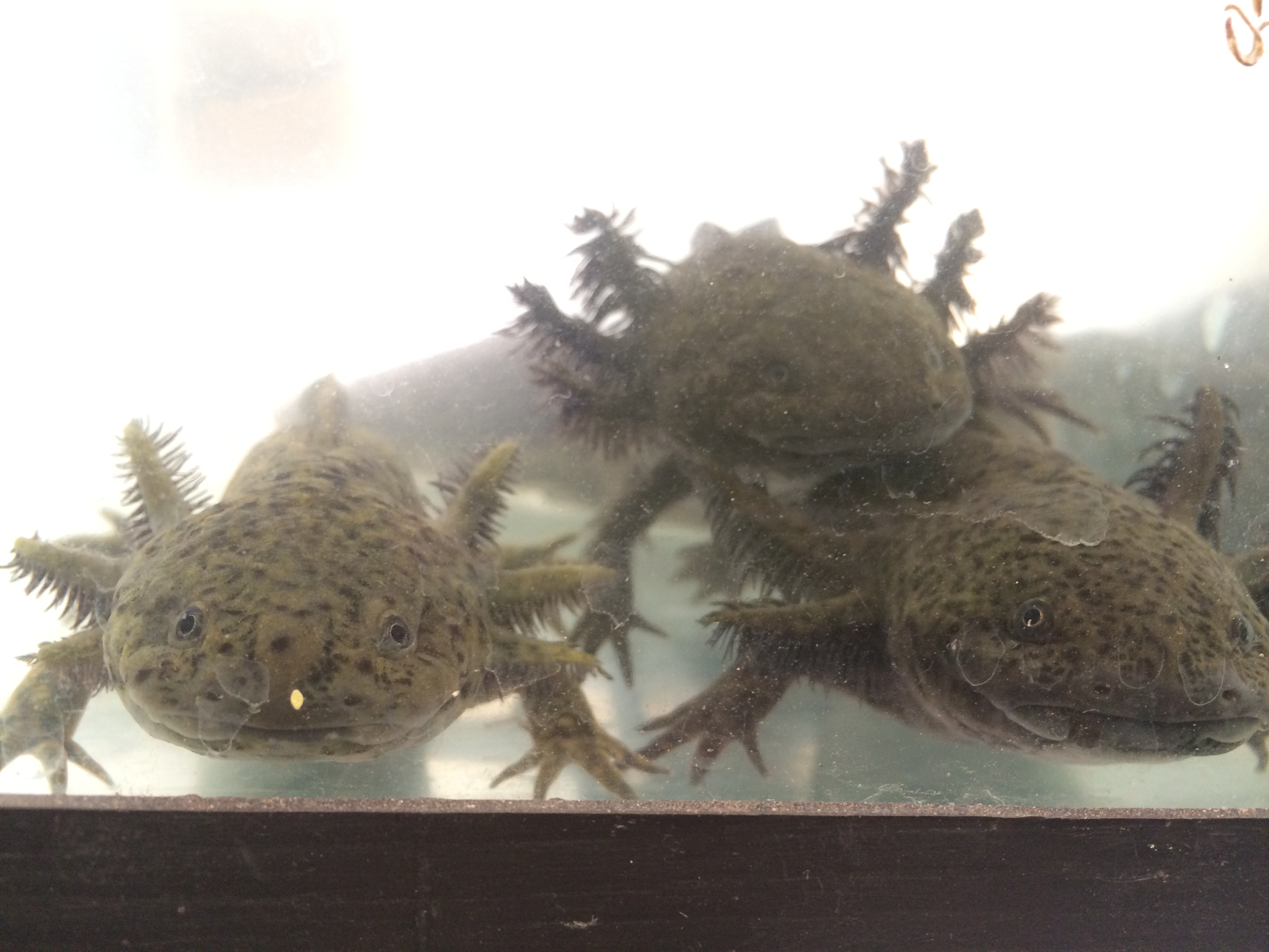 Ajolote